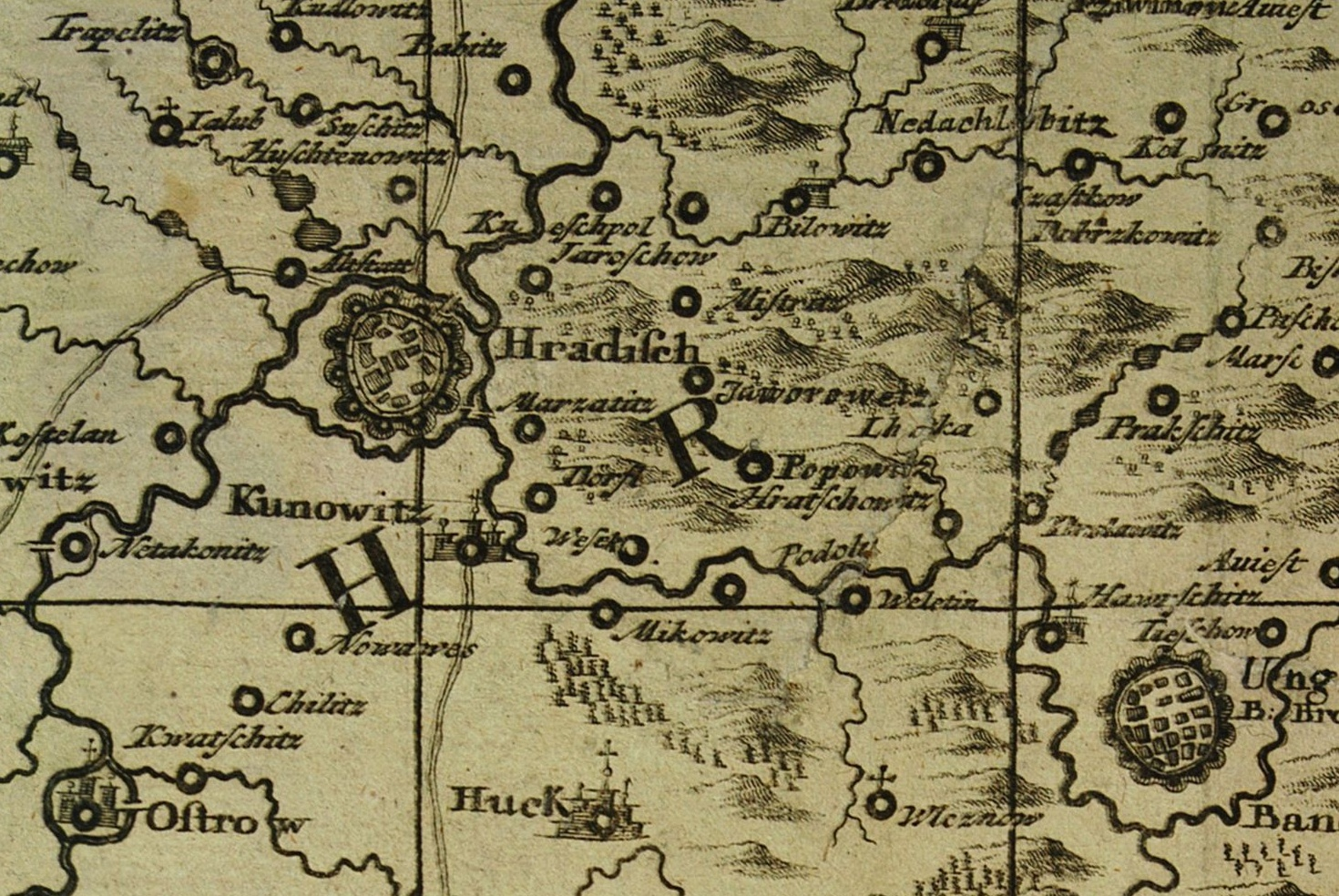 Výřez z Müllerovy mapy Moravy, mapový list 15 - oblast mezi Starým Městem a Uherským Brodem.